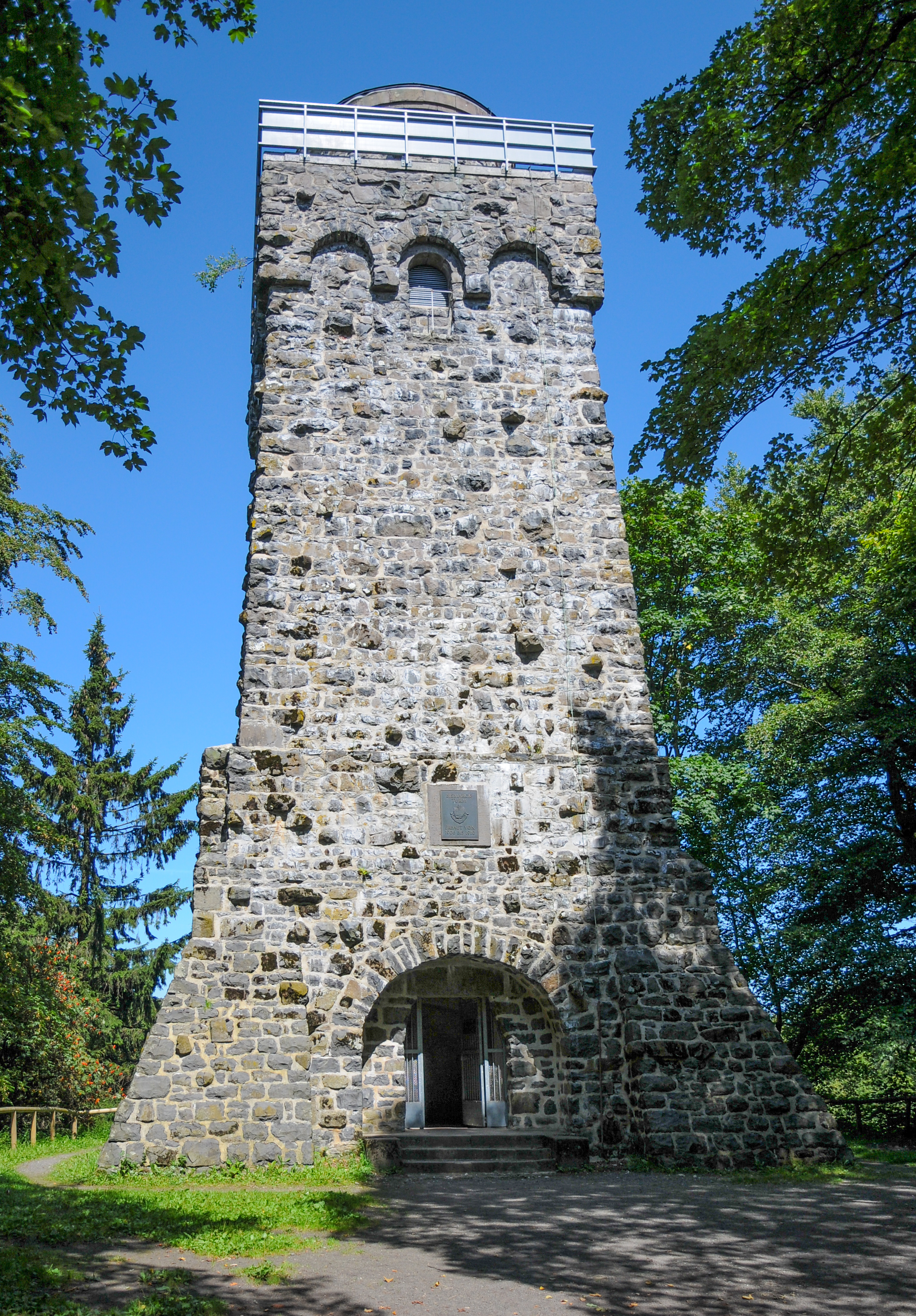 Bismarckturm auf dem Gipfel des Taufstein, Vogelsberg